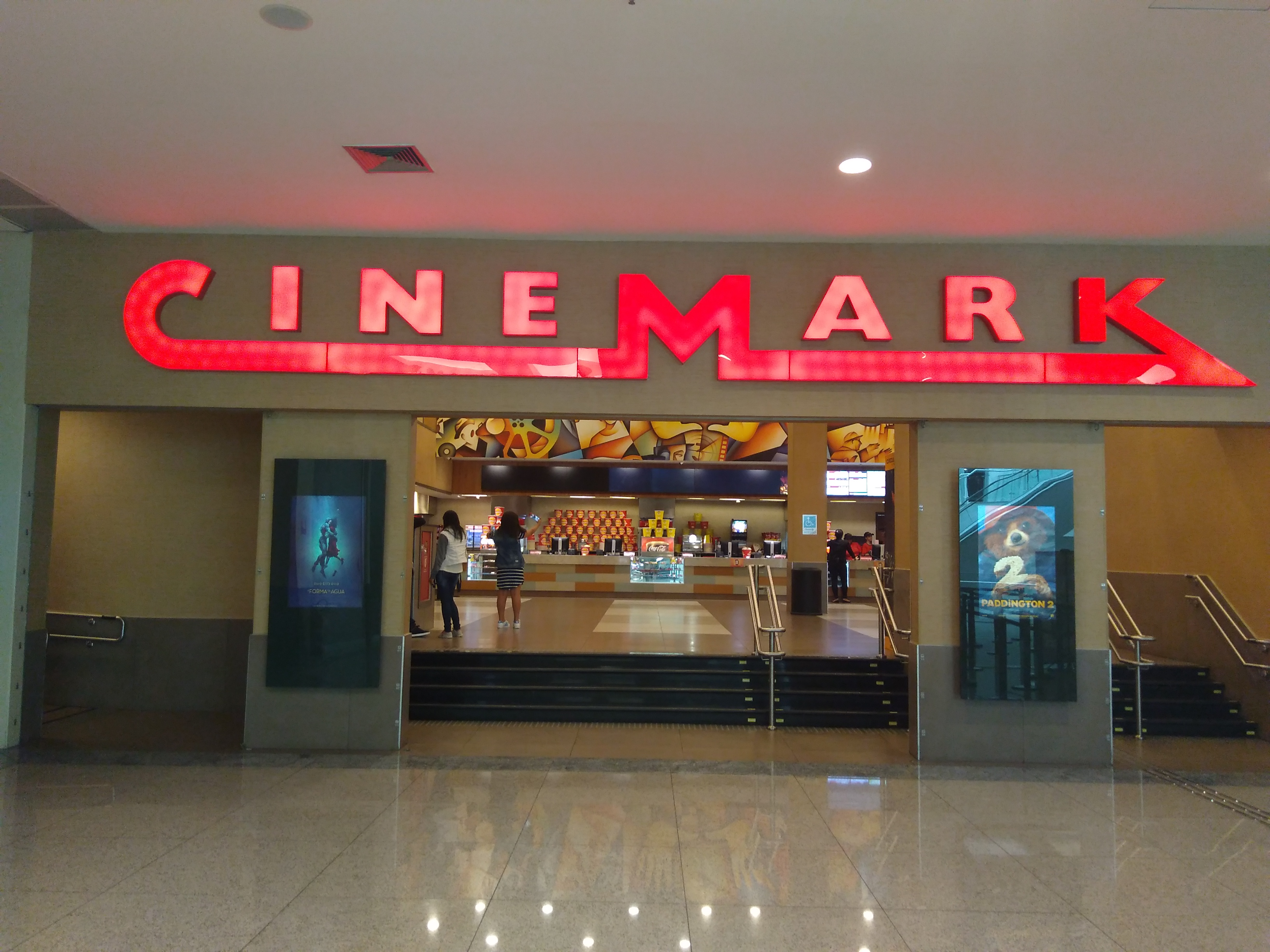 Vista externa do Cinemark Metrô Tatuapé de São Paulo, SP